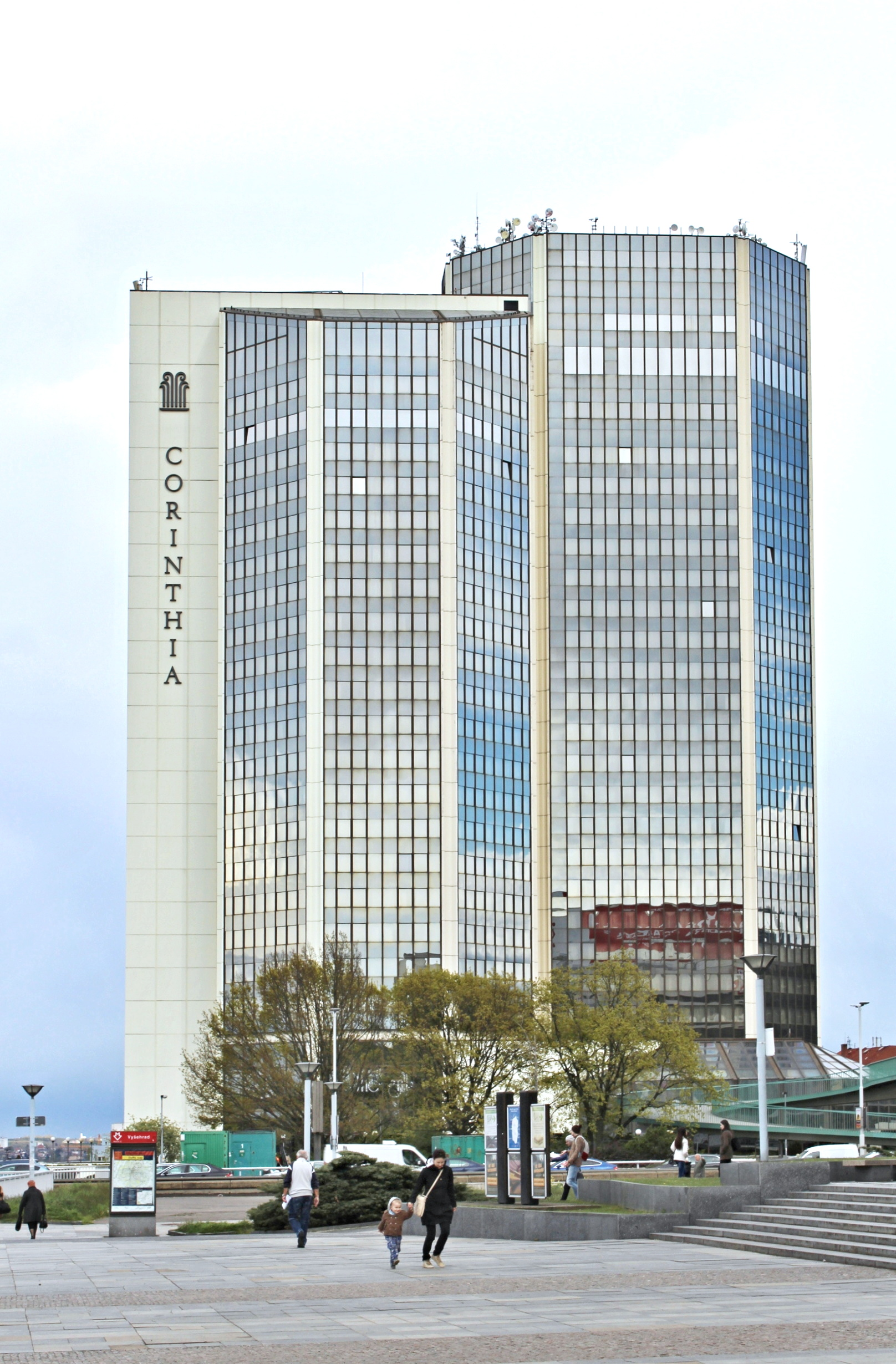 Hotel Corinthia Towers